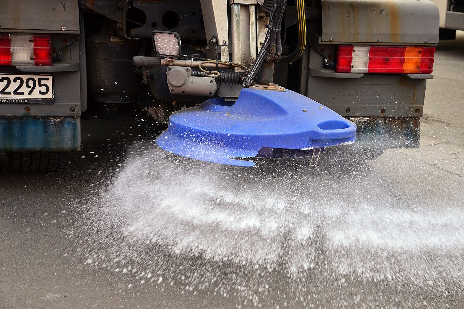 Streuwagen, MVA Hamm / Recyclinghof Hamm, OBesichtigt